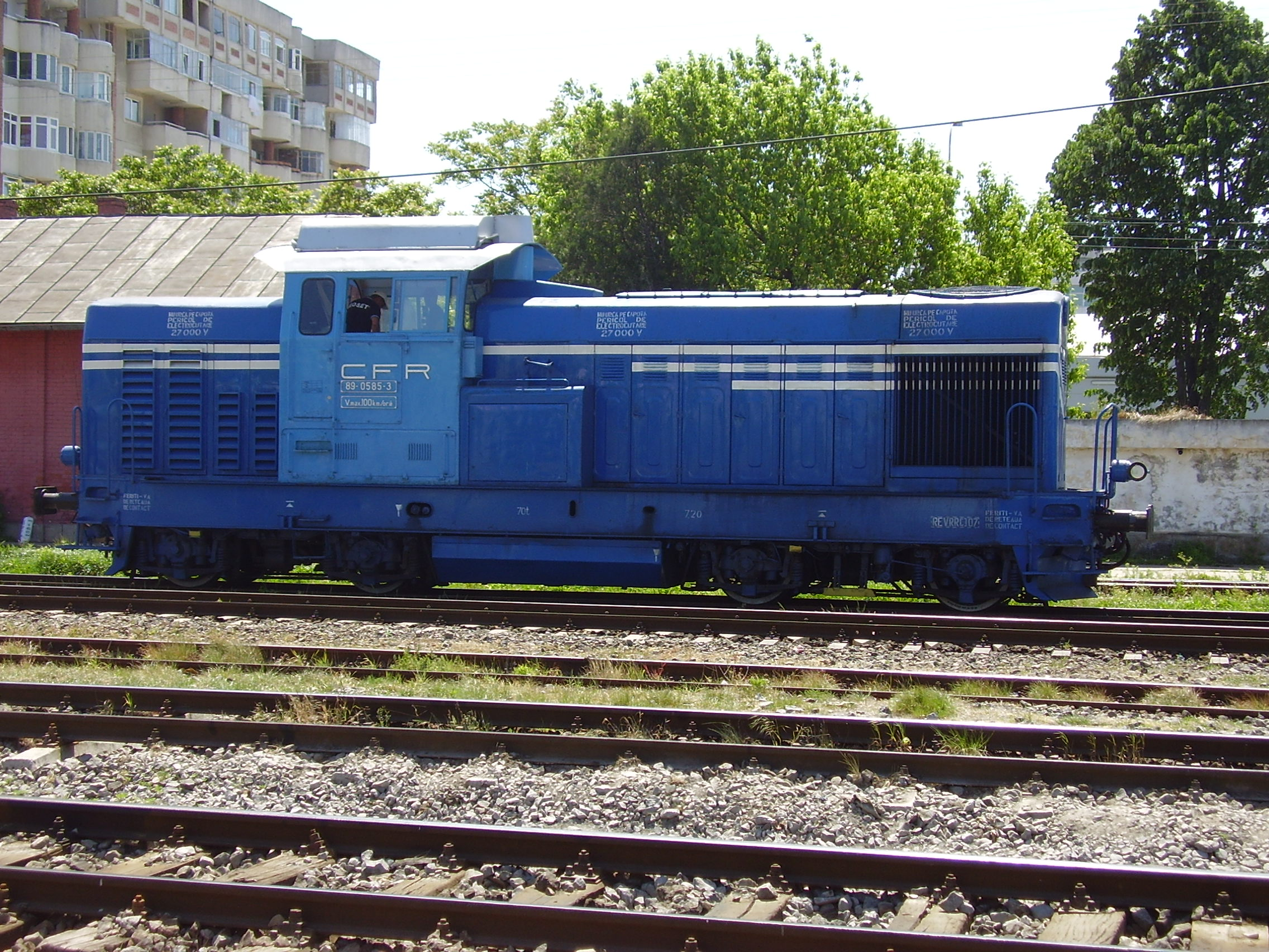 Locomotive classe 89 des CFR à Pitesti